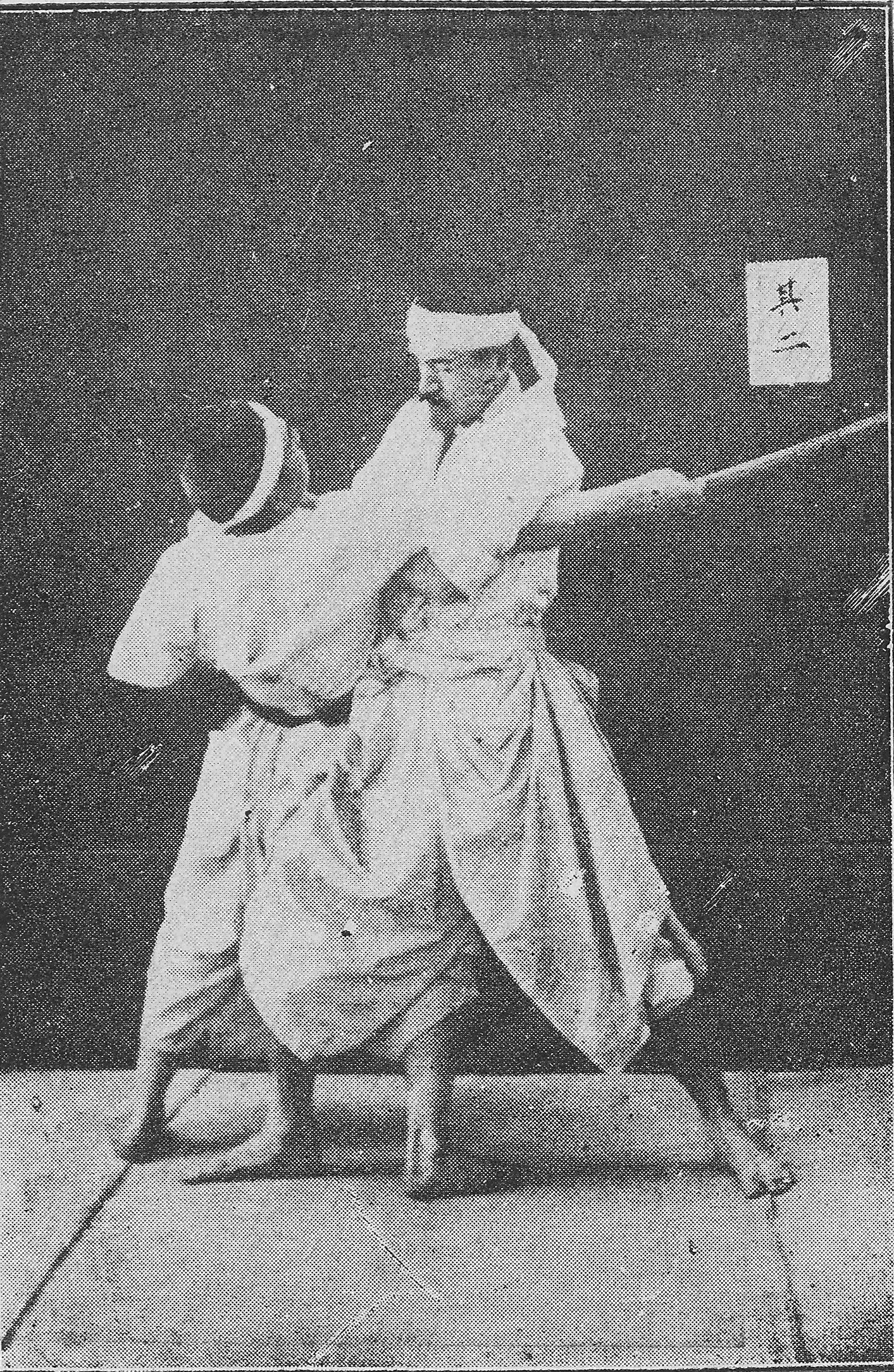 神道六合流柔術 三尺間